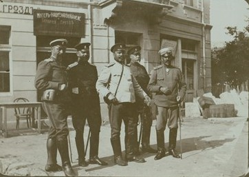 Офицери от щаба на Пета пехотна дунавска дивизия в Белоградчик